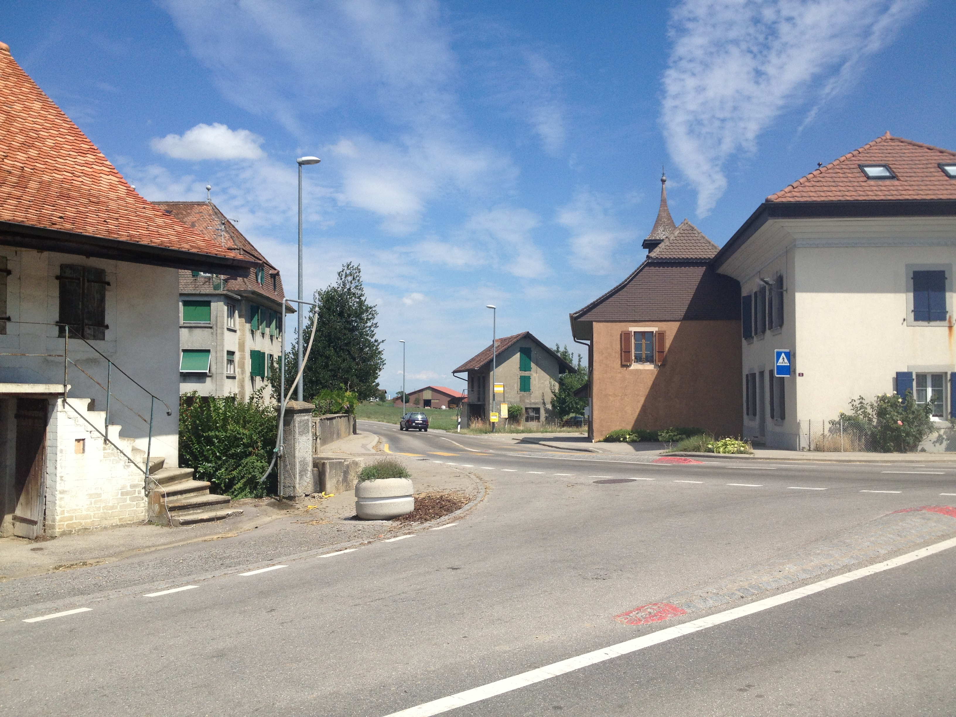 Rossens dans la commune vaudoise de Villarzel en Suisse.